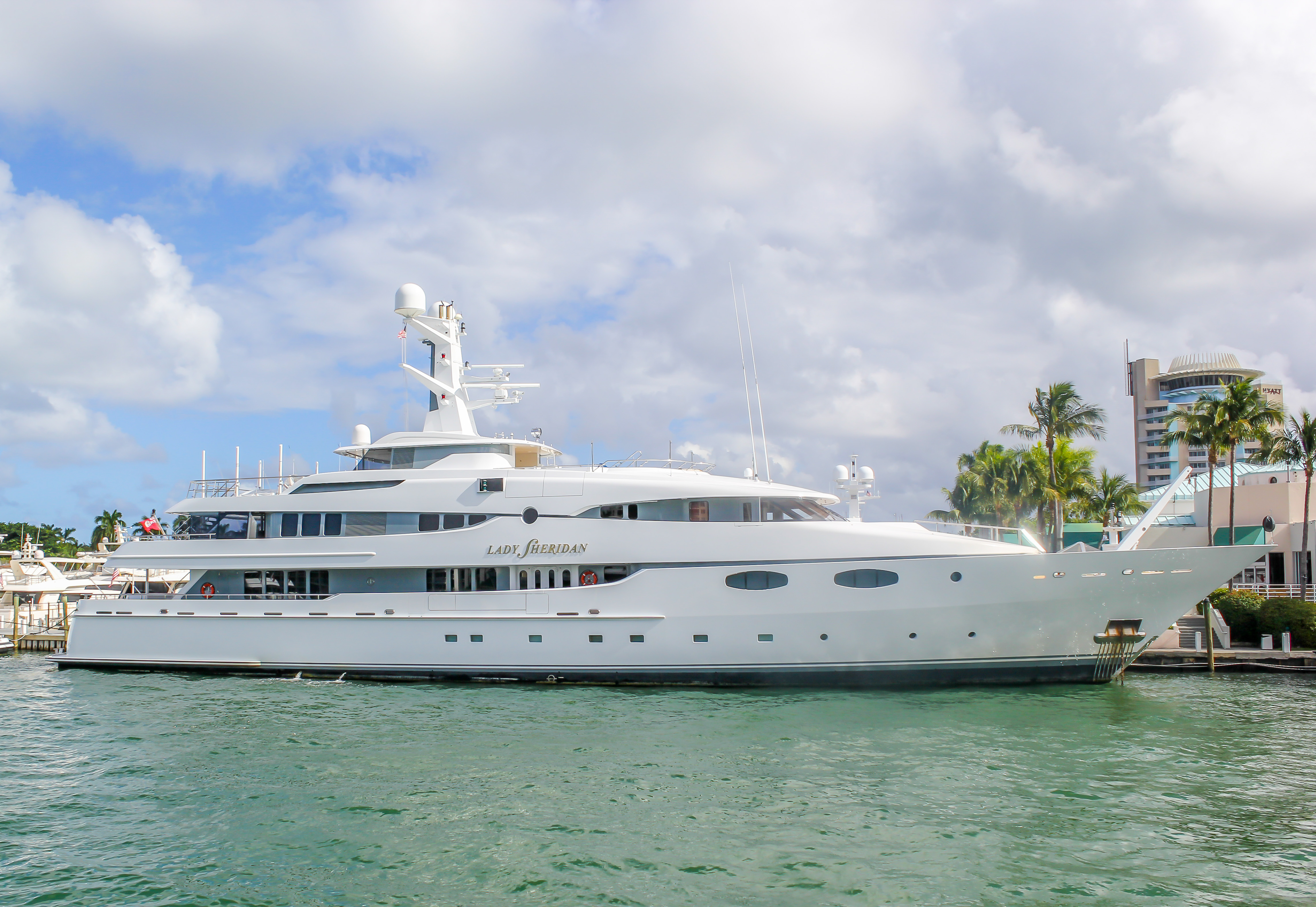 Port Everglades